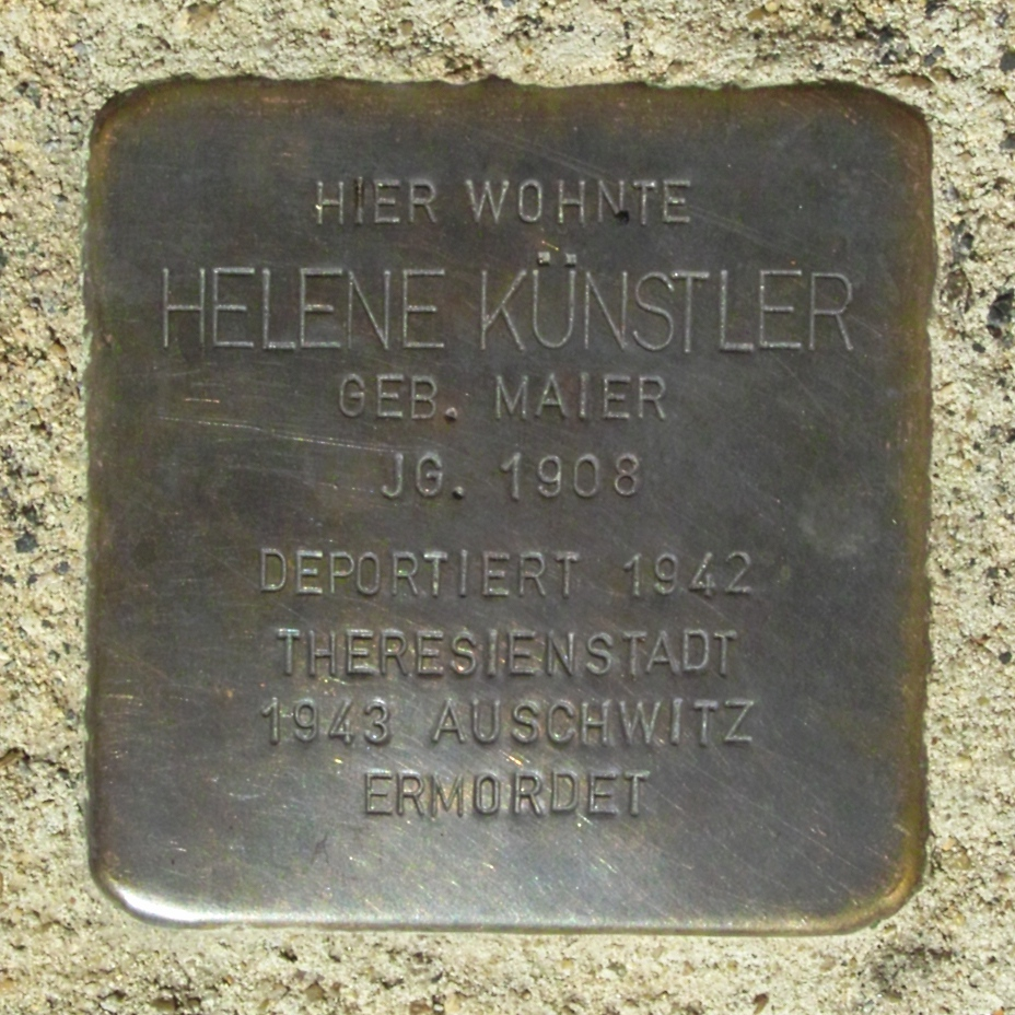 Stolperstein für Helene Künstler in D-74081 Heilbronn(-Horkheim), Hohenloher Straße 15